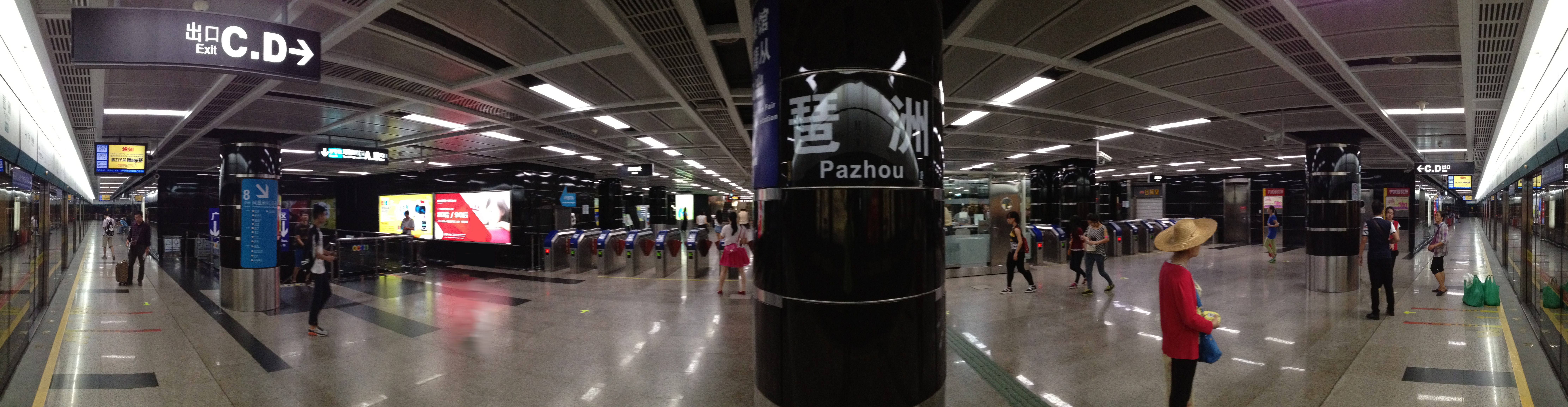 广州地铁琶洲站月台全景图